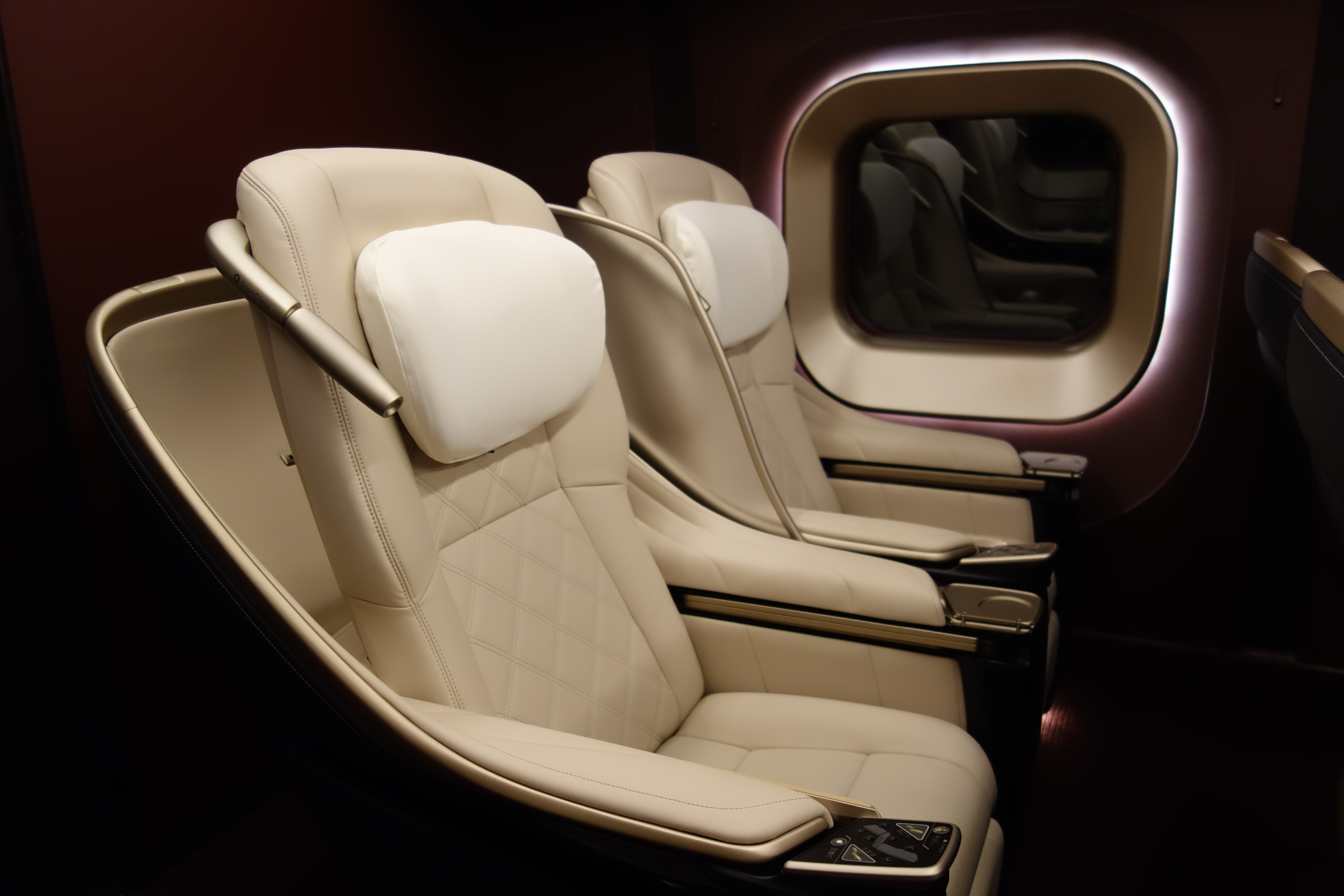 E7系 グランクラスの座席（二人席） E714-7（F7編成）